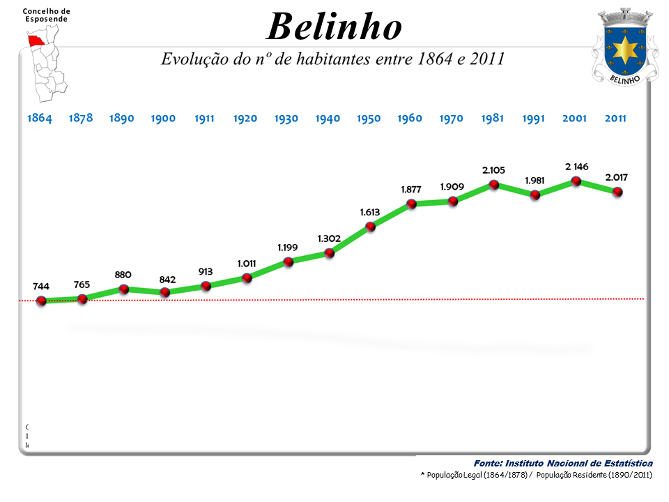 Censos 1864/2011